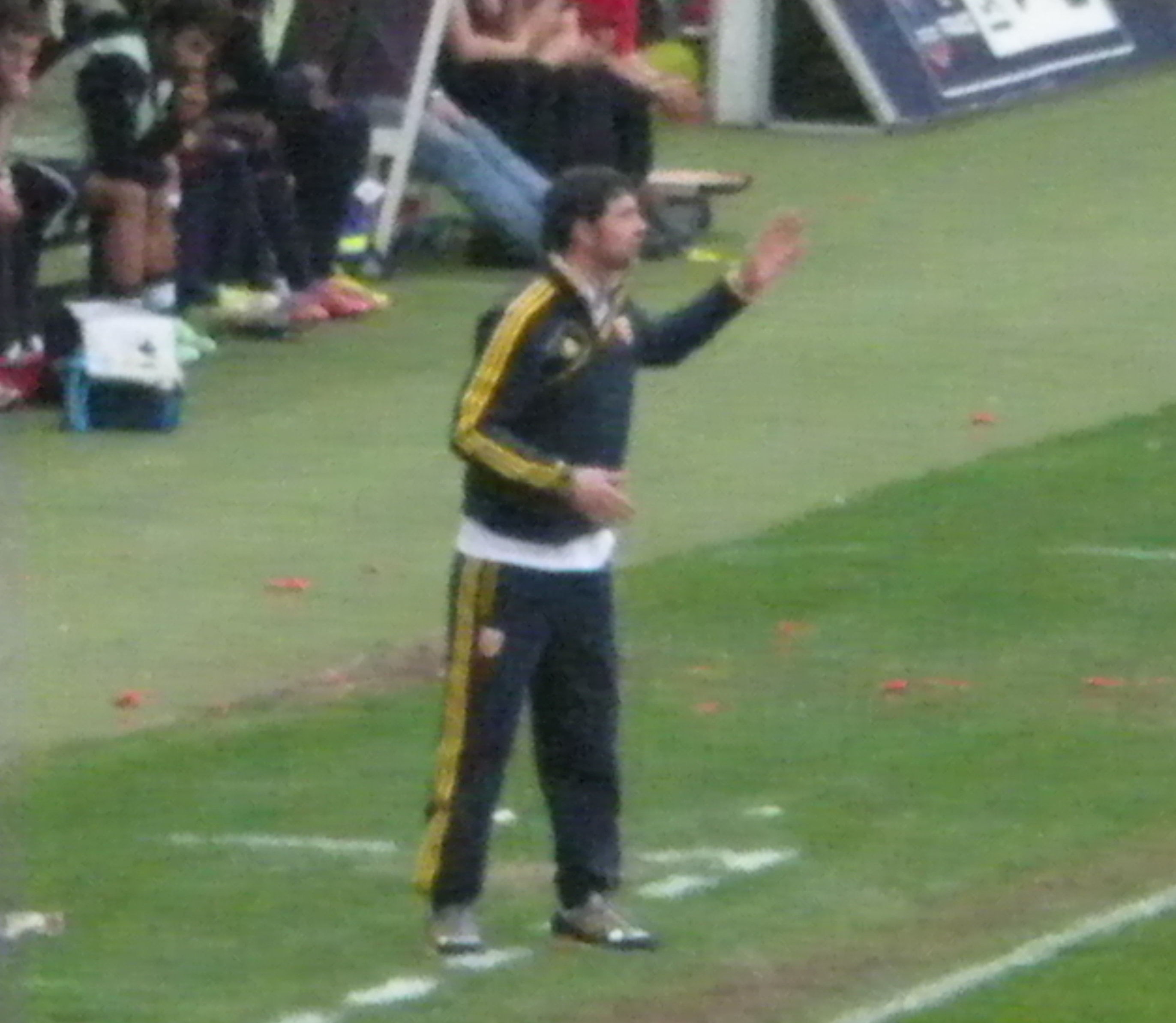 Photo d'Eric Sikora, entraîneur du RC Lens en 2012-2013, ici contre Bordeaux en quart de finale de la Coupe de France 2012-2013.